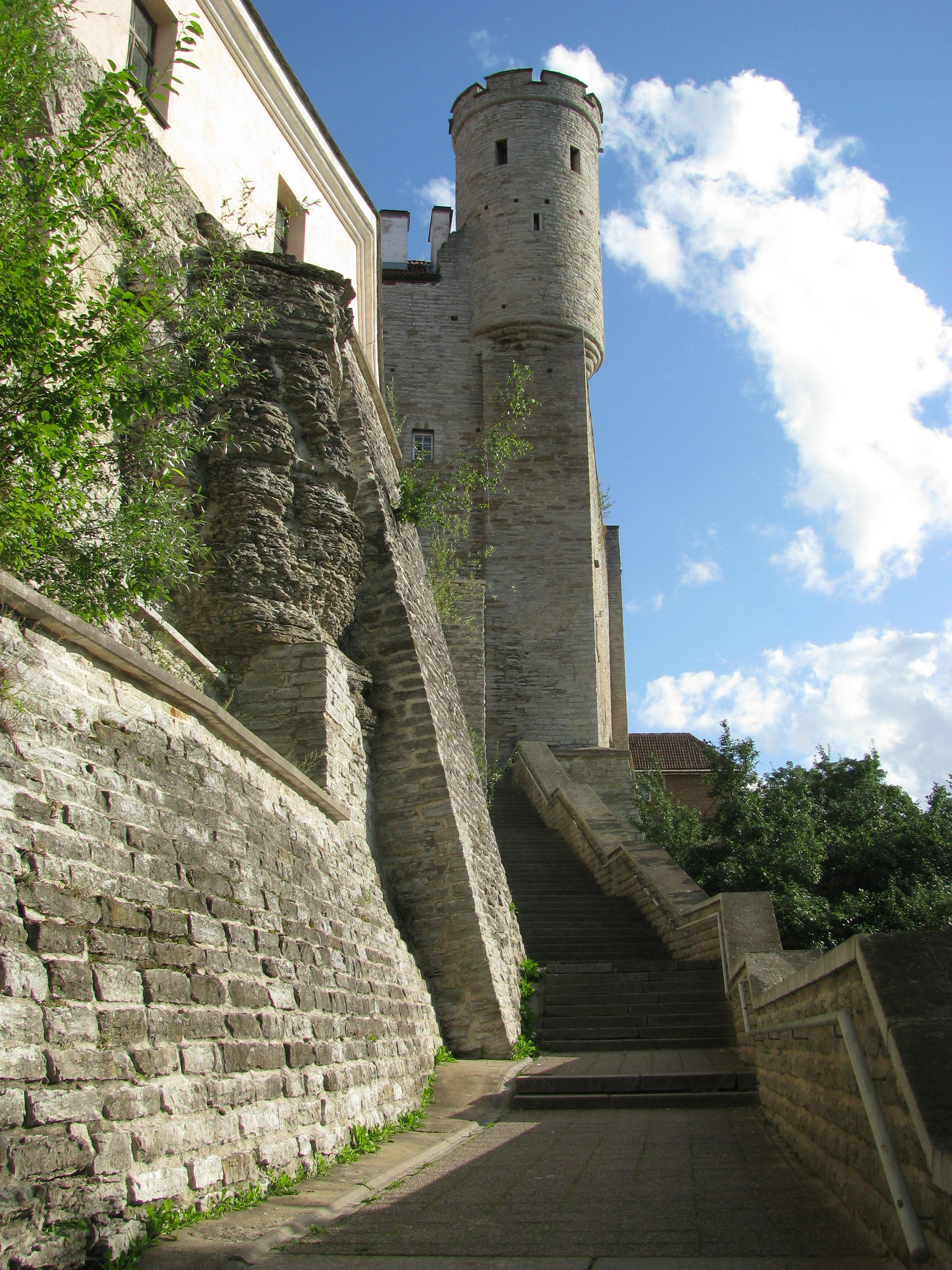 Pilstickeri torn Toompea lossis, vaade treppide poolt.